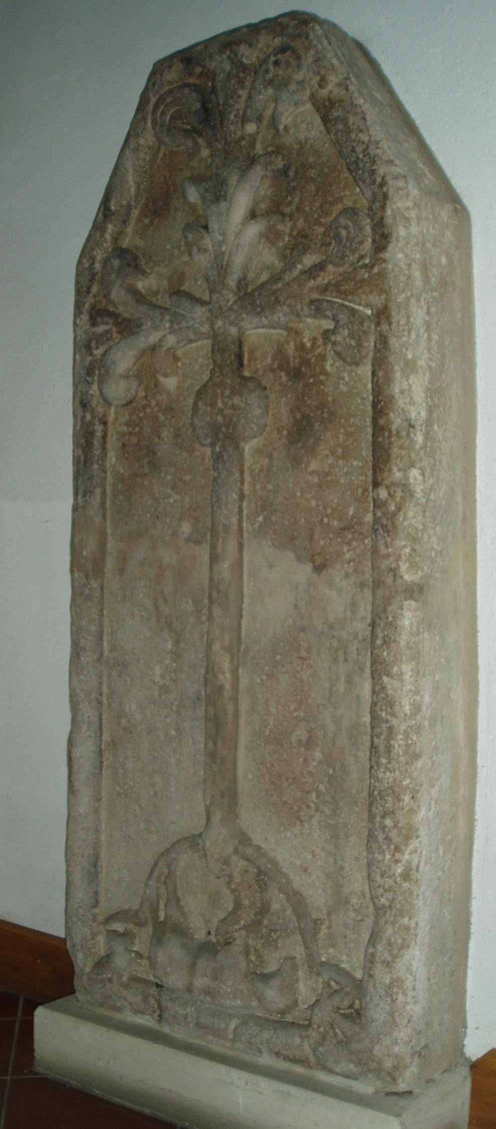 Grabplatte in der Kirche von Alland. Nach der Sage Grundlage der Kirchengründung von Maria Raisenmarkt.